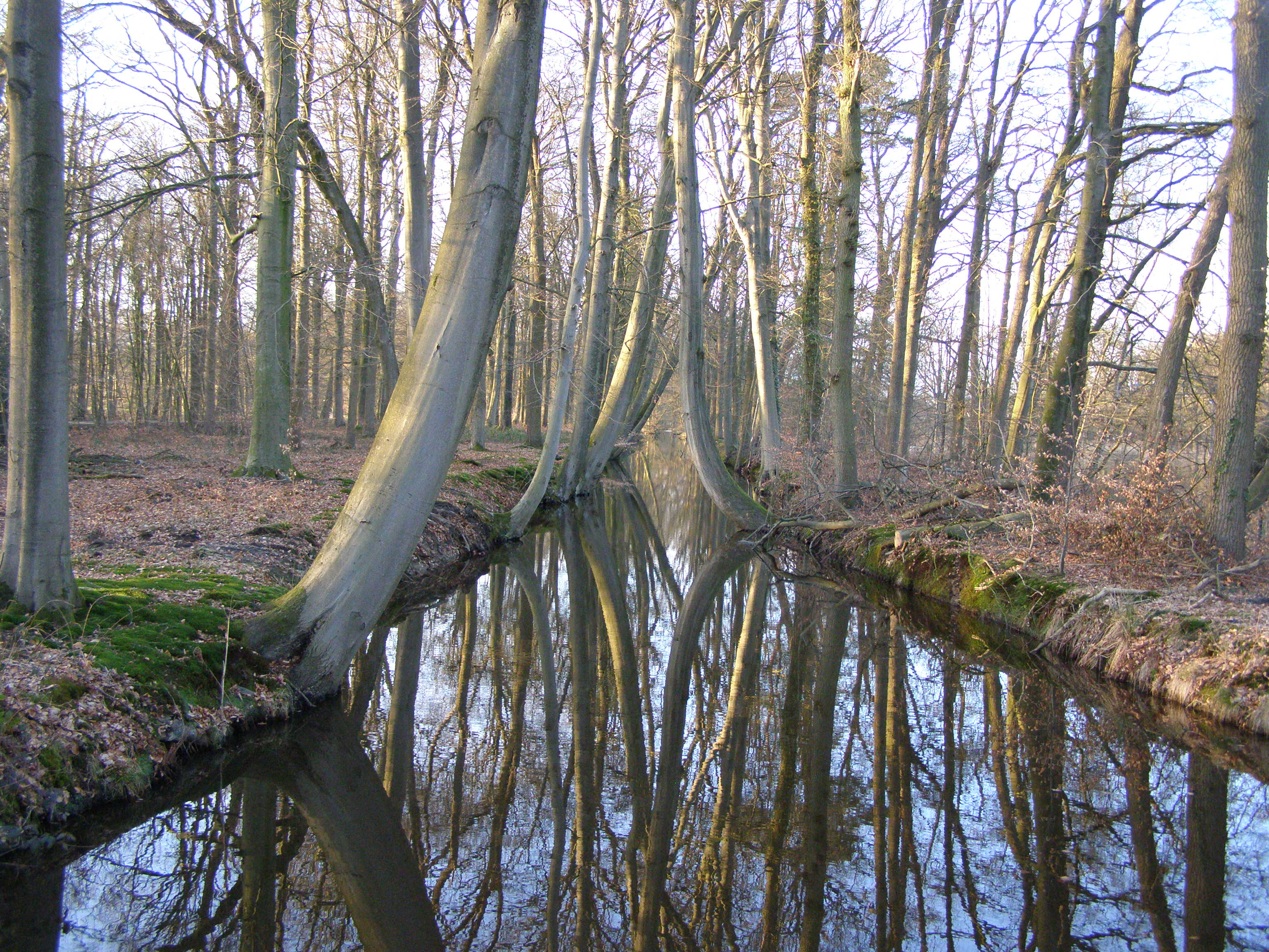 Oelerbeek in maart